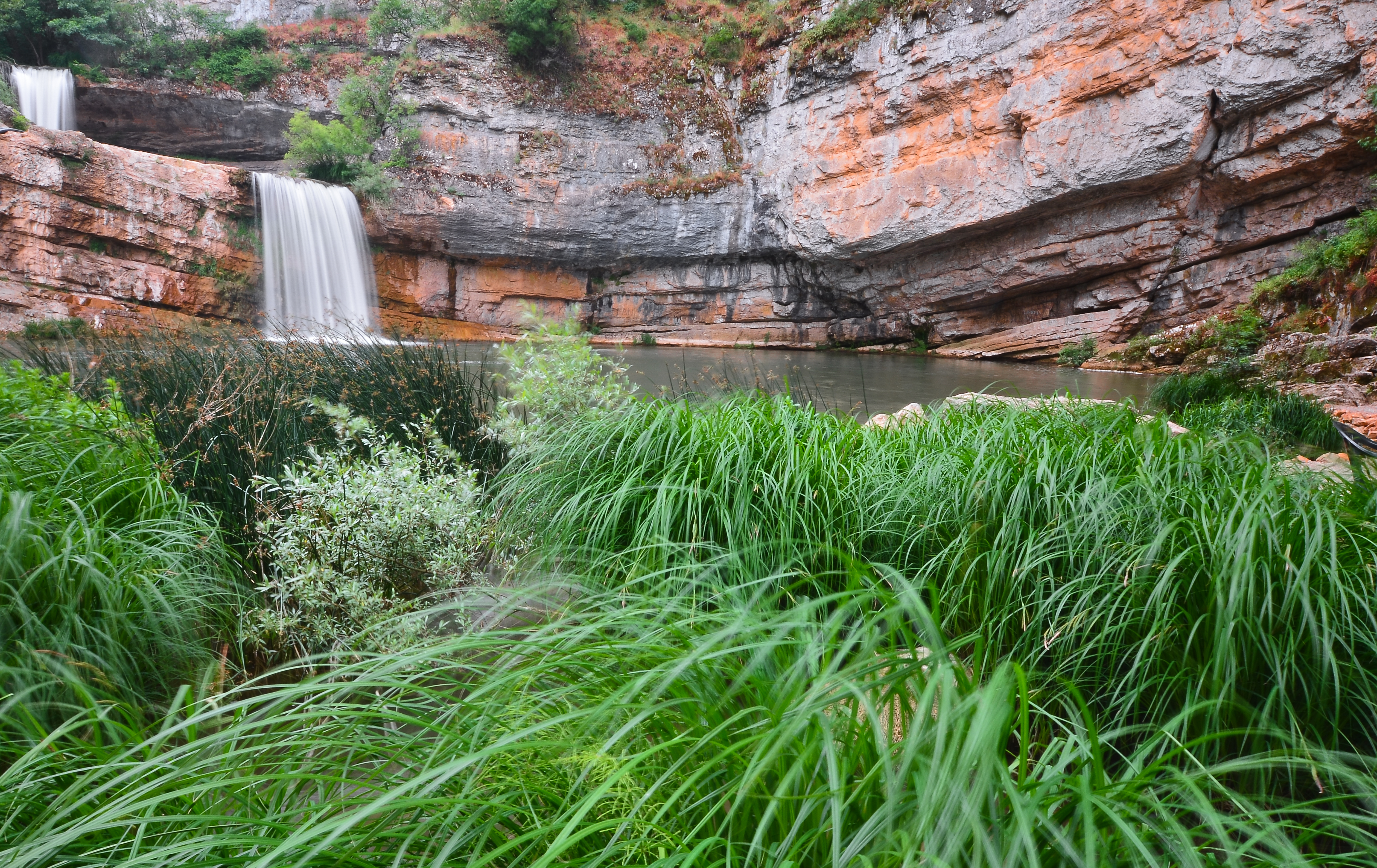 Mirusha, Malishevë, Klinë, Rahovec